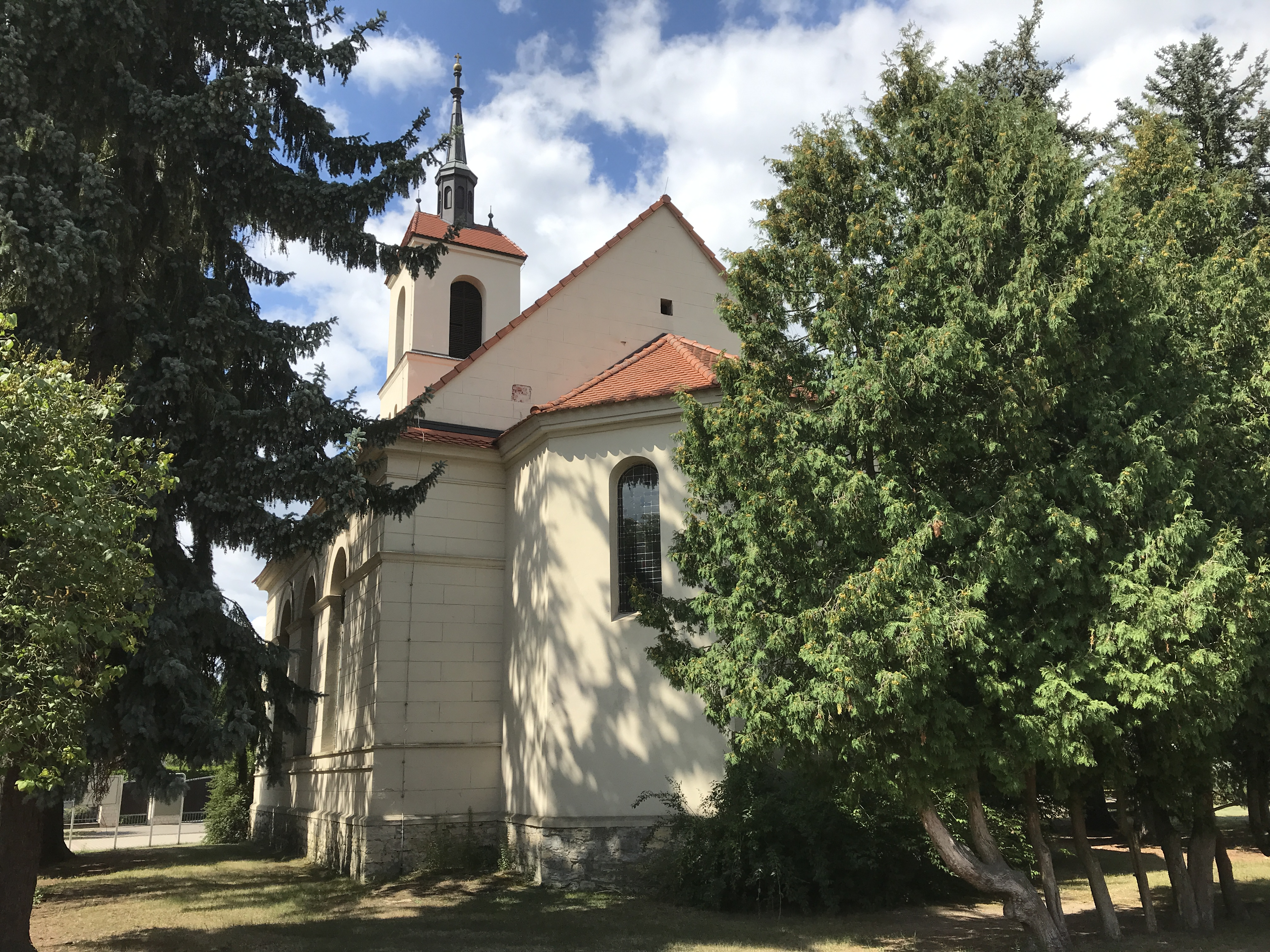 Die Dorfkirche Berkenbrück im Landkreis Oder-Spree entstand im Jahr 1832. Die Kirchenausstattung stammt aus der Bauzeit